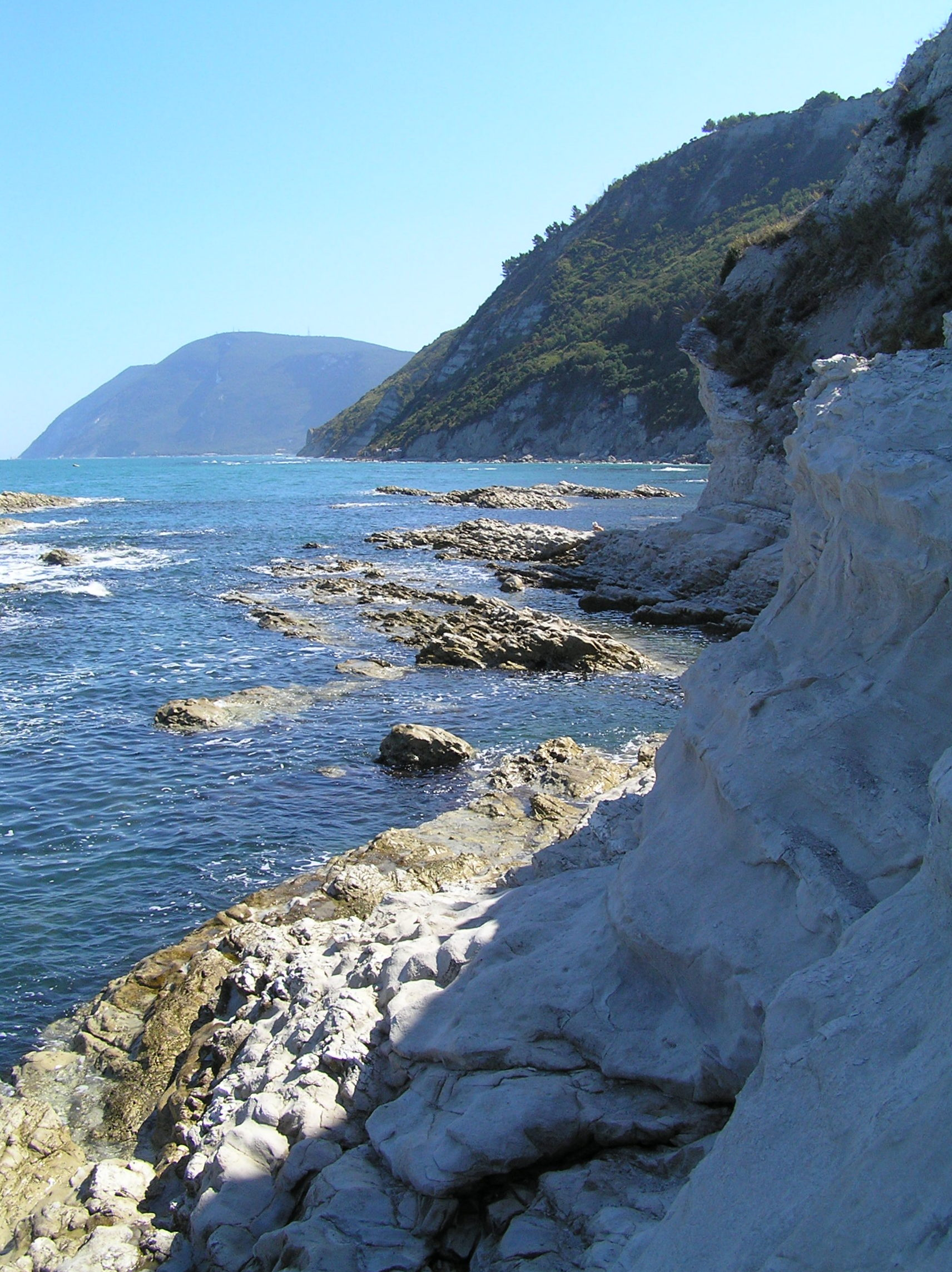 Ancona - rione di Pietralacroce - veduta della costa, dalla scogliera dei Draghetti verso Monte Conero